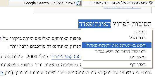 תמונת מסך של חיפוש מהיר בפיירפוקס.